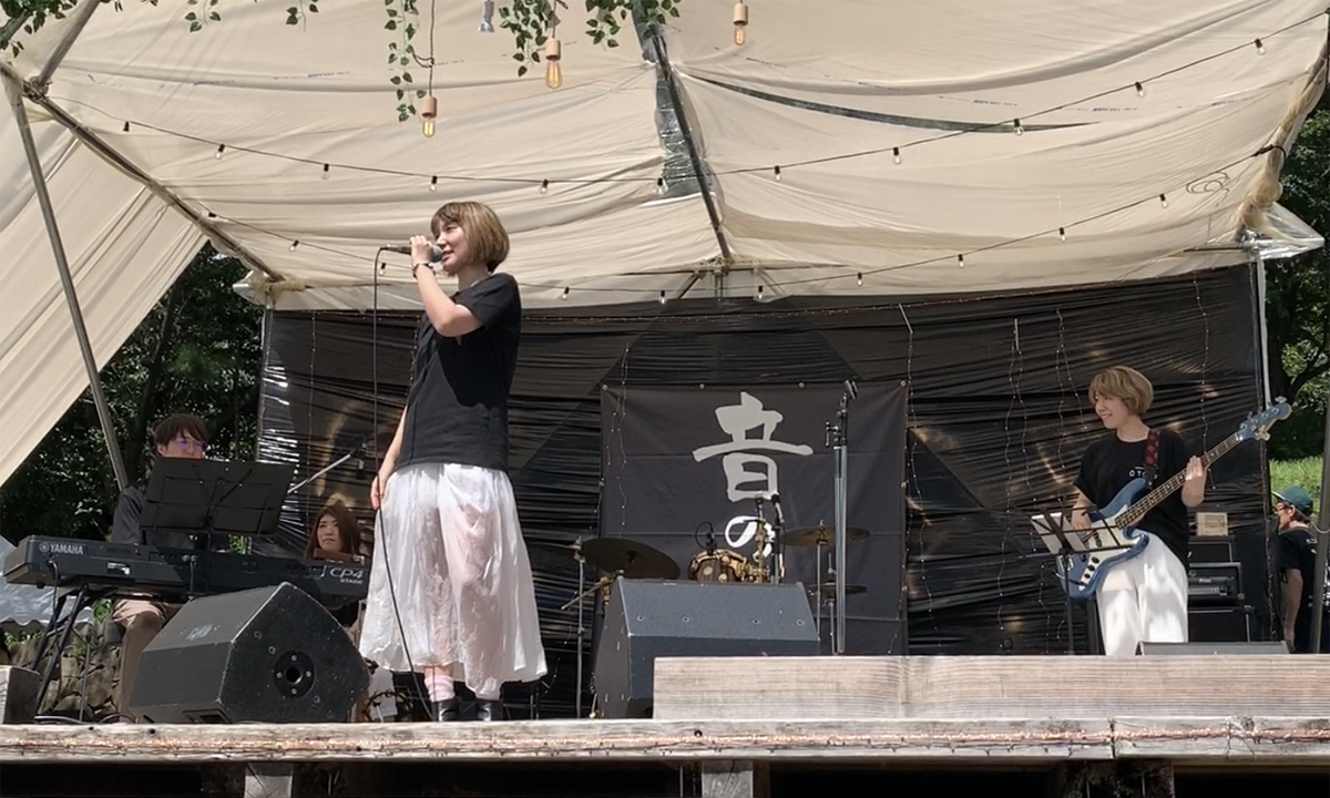 エナ（音の滝vol.2@飛鳥山公園、2019年9月7日撮影）